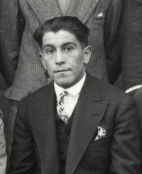 Guillermo Saavedra in 1928